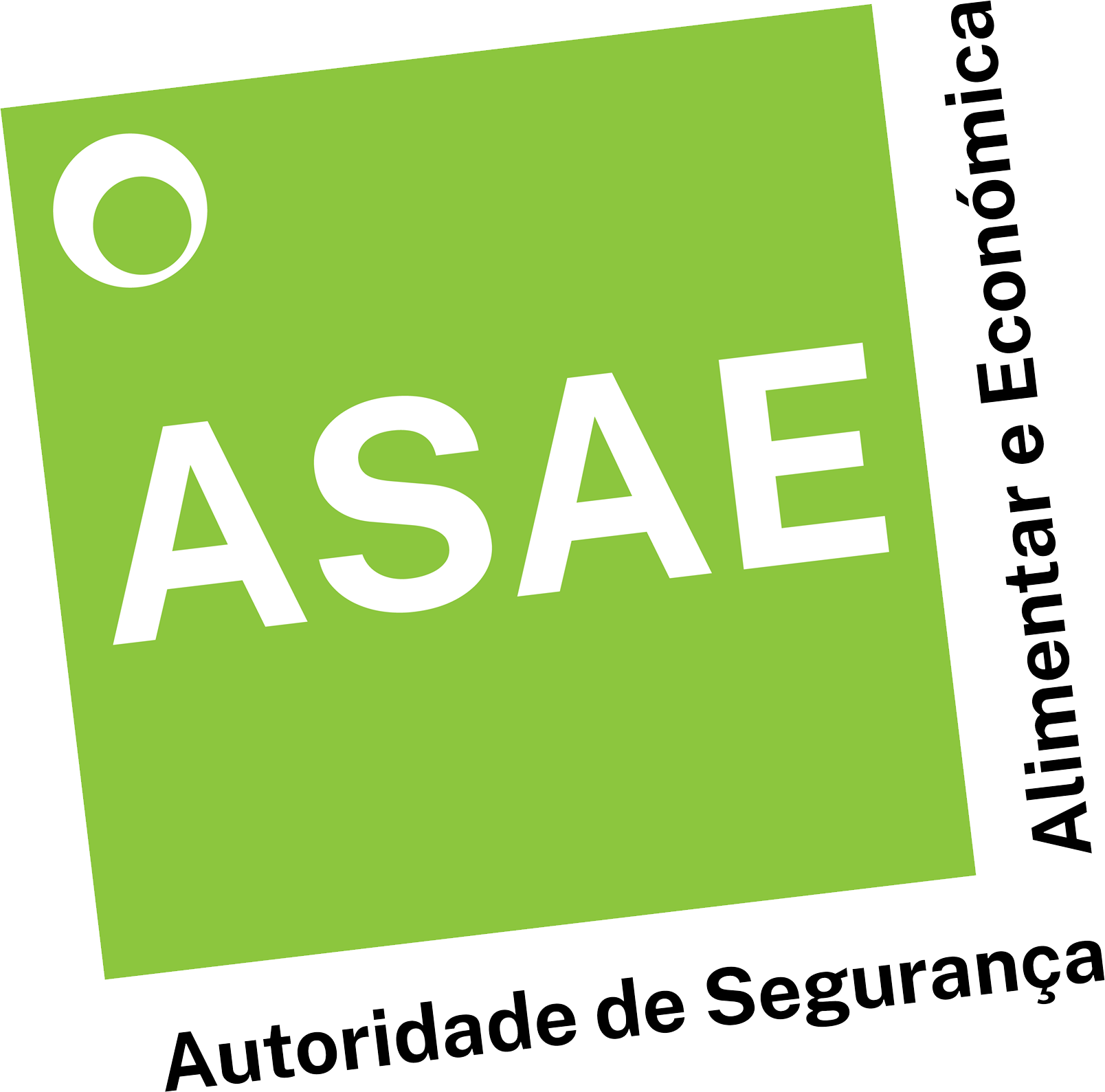 Logotipo da Autoridade de Segurança Alimentar e Económica (ASAE).